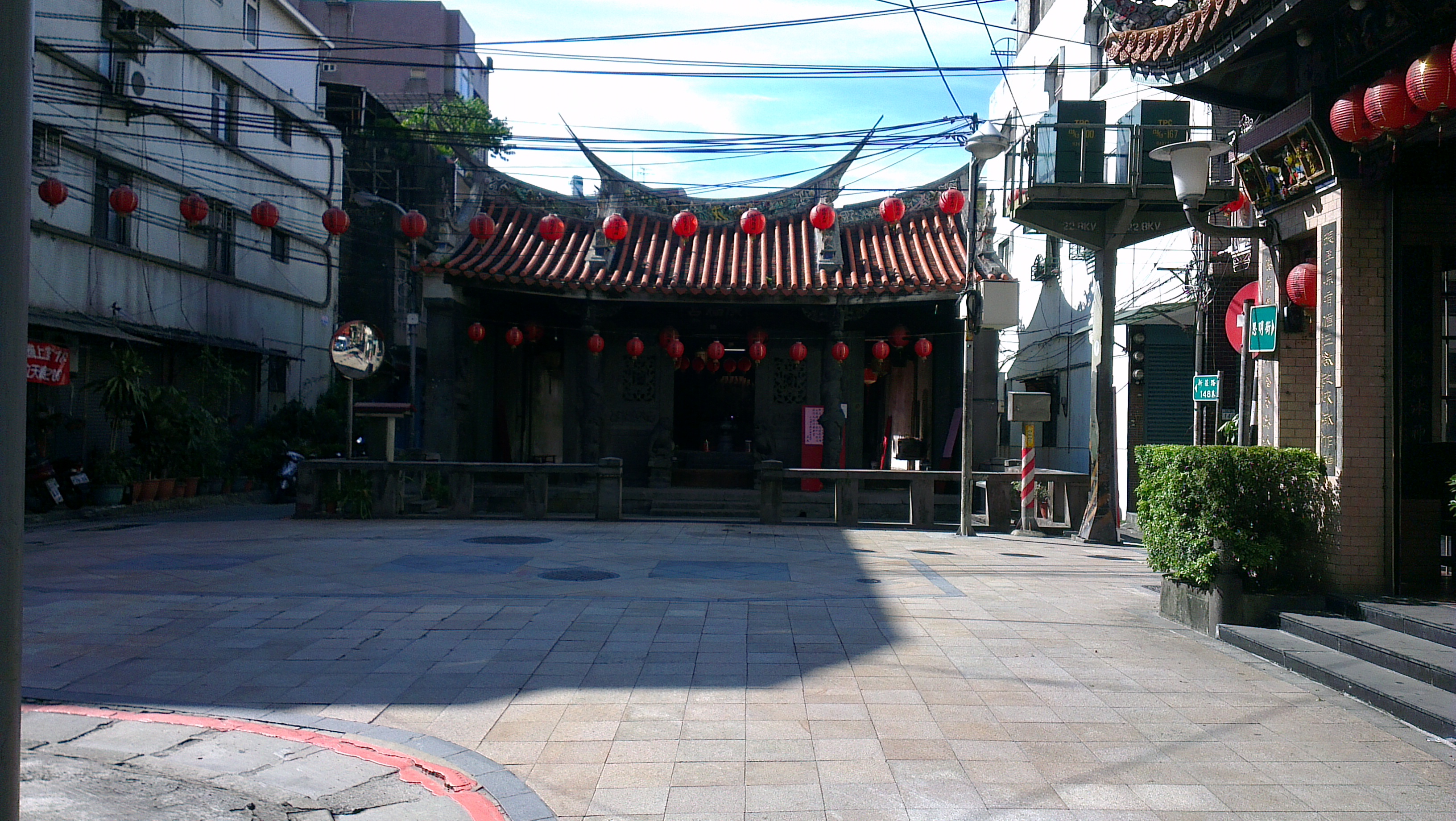 新莊廣福宮